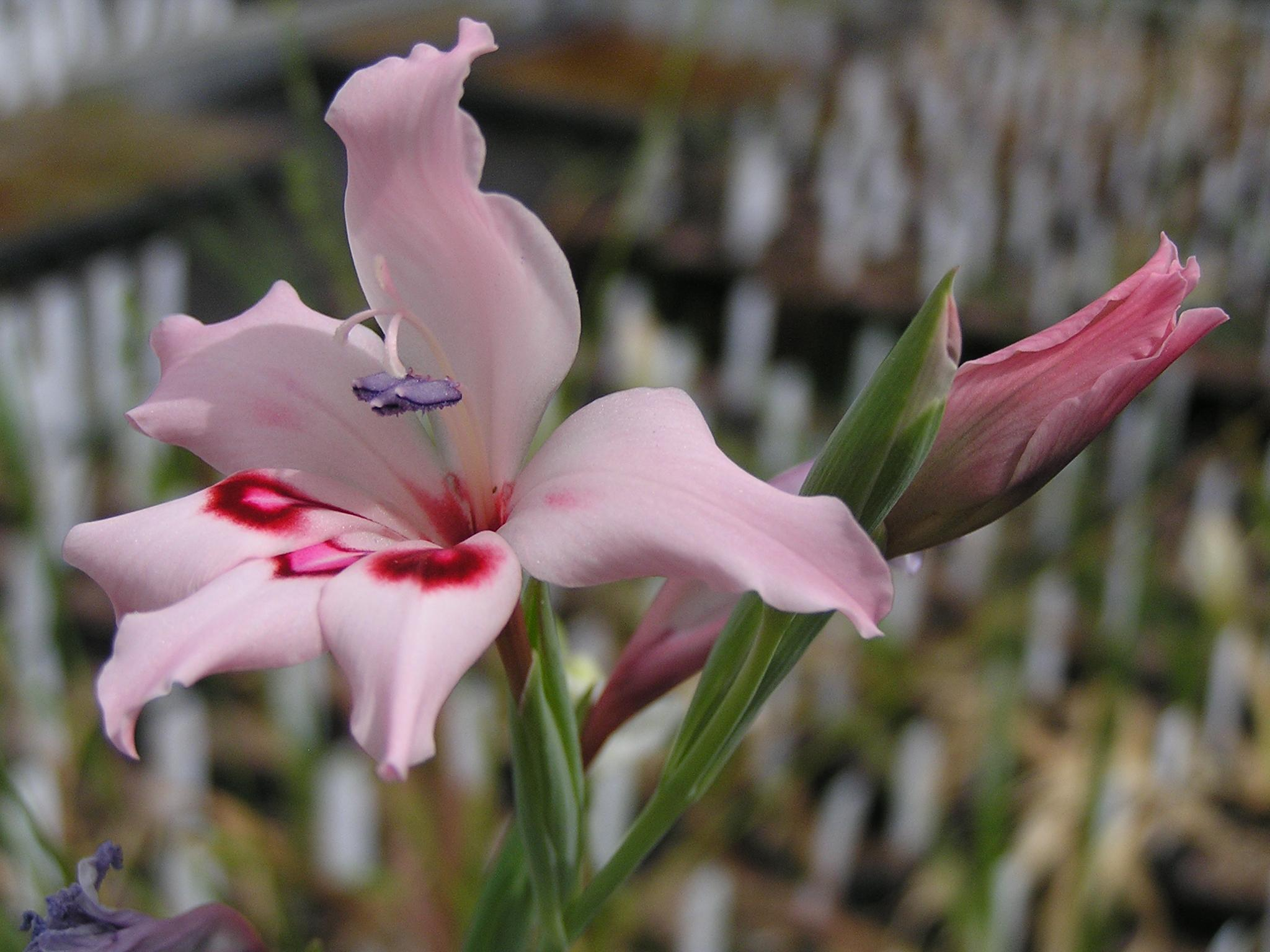 Exbury gardens